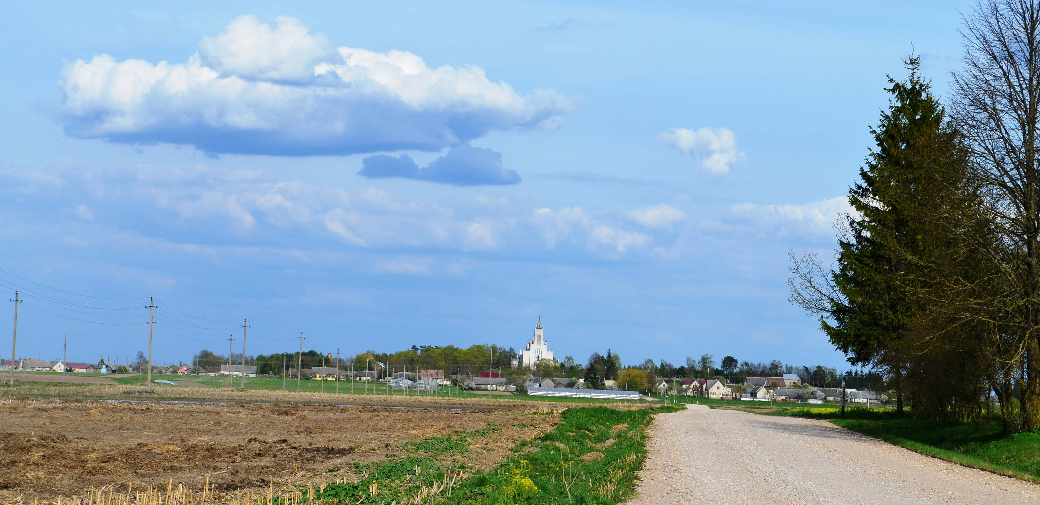 Truskavos mst., Kėdainių raj.